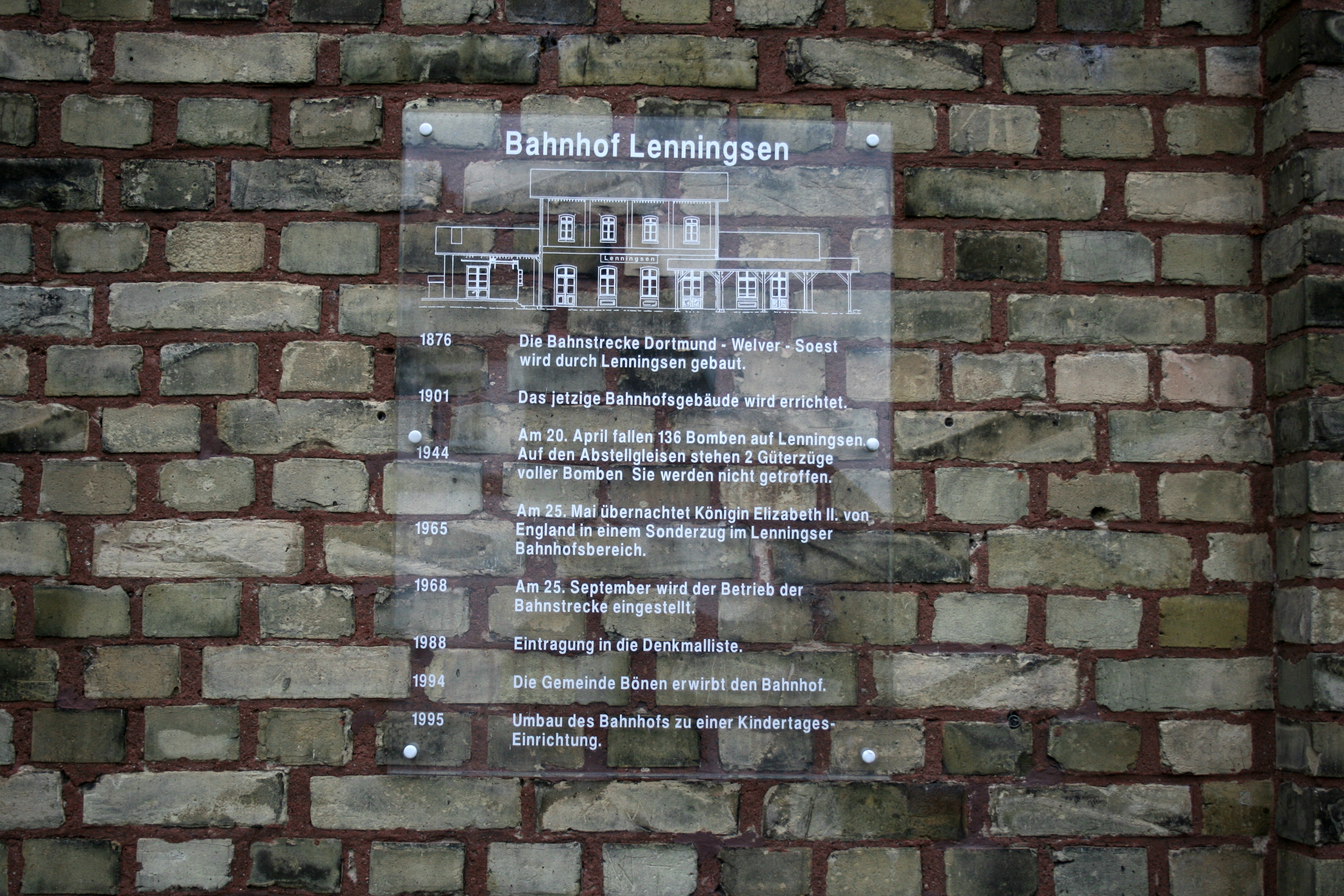 Erinnerungstafel am Empfangsgebäude Bahnhof Lenningsen